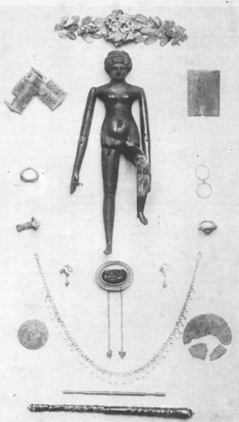 Tav. VIII. Corredo funebre del sarcofago di Crepereia Tryphaena Lanciani, R. (1889). Delle scoperte avvenute nei disterri del nuovo Palazzo di Giustizia. Bullettino della Commissione Archeologica comunale di Roma. 3 (in Italian). Roma: Tip. della R. Accademia dei Lincei. pp. 173-178, Plate VIII. See also: [1] or [2].